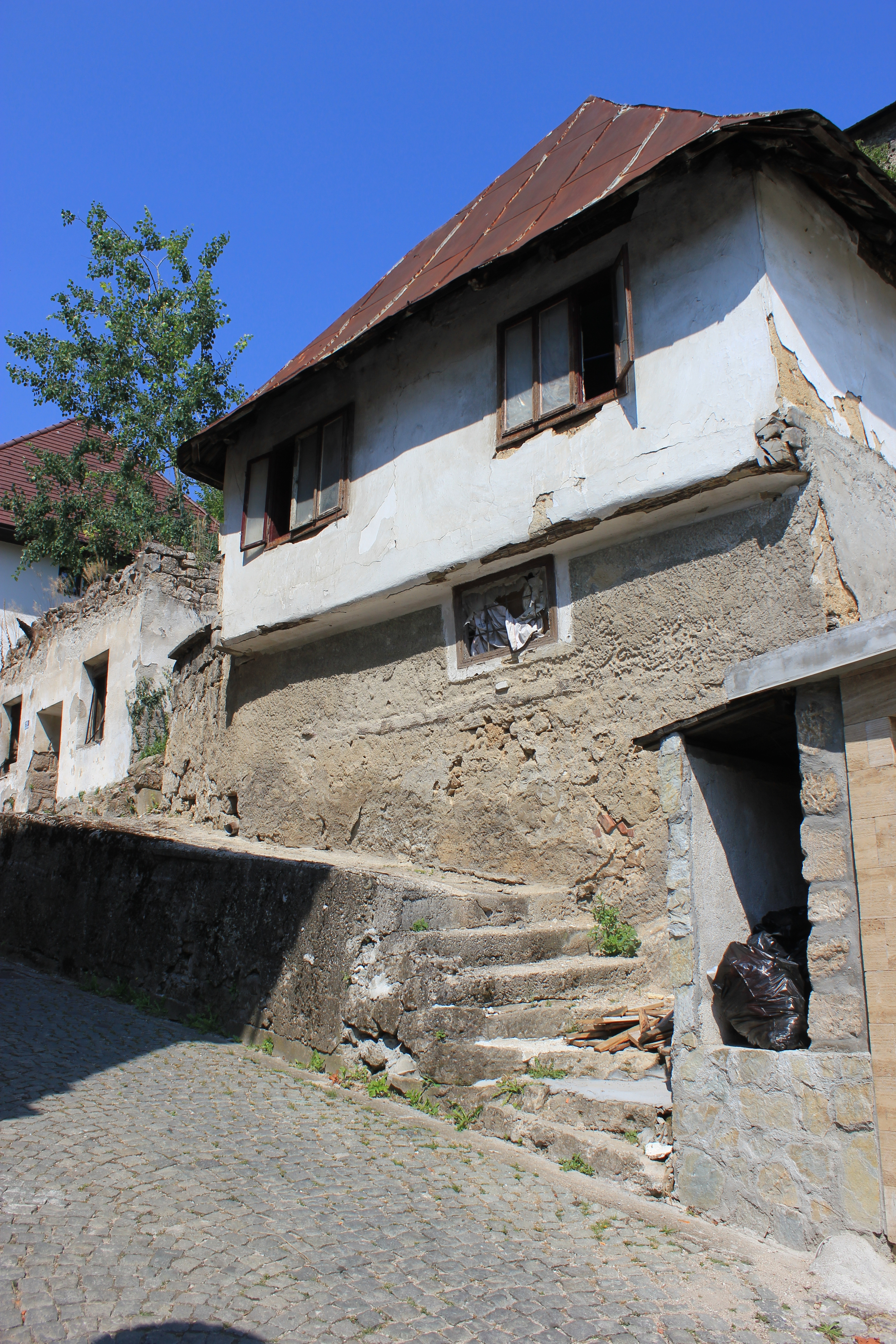 Traditionelles Haus in der Altstadt von Jajce